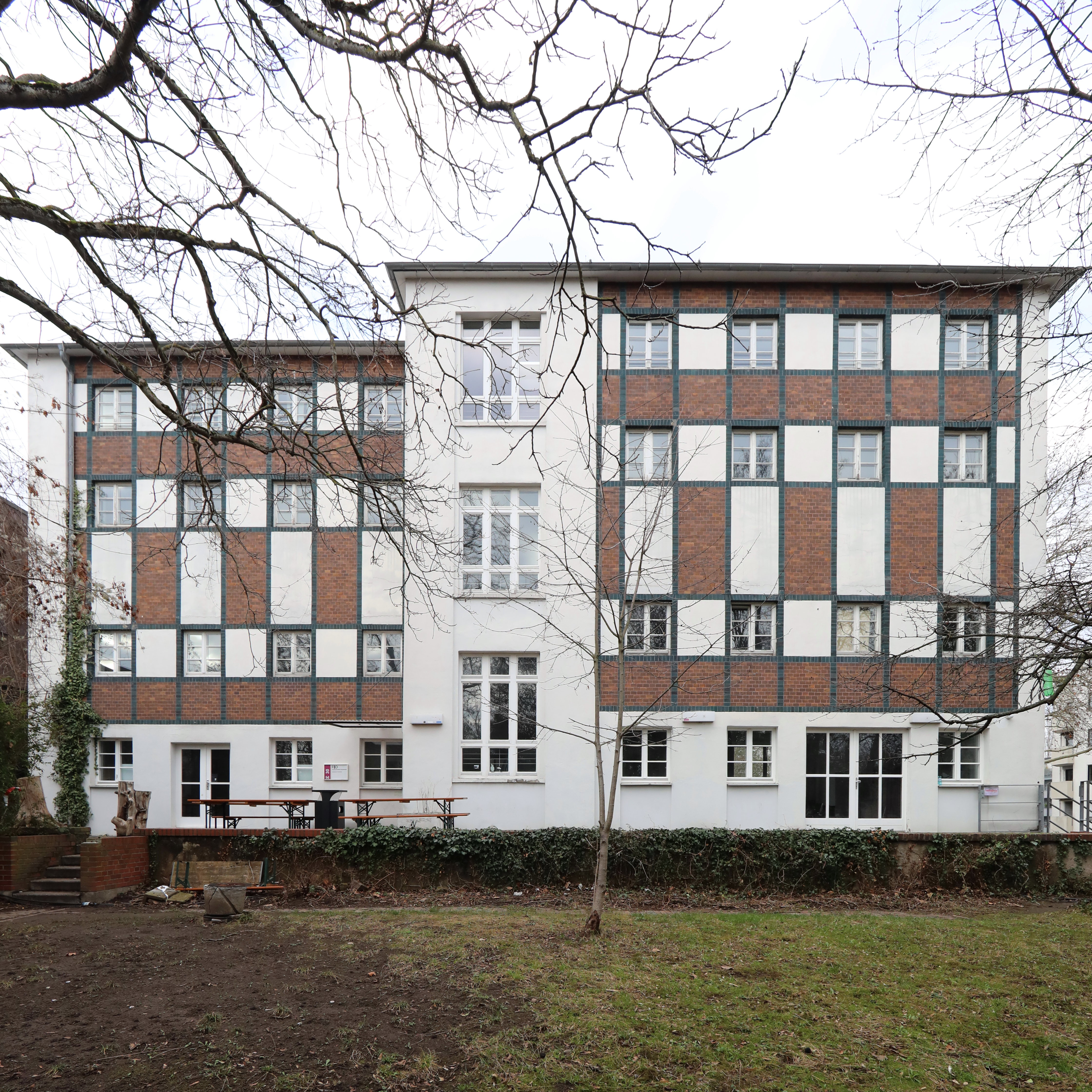 Olbrichweg 8 in Darmstadt